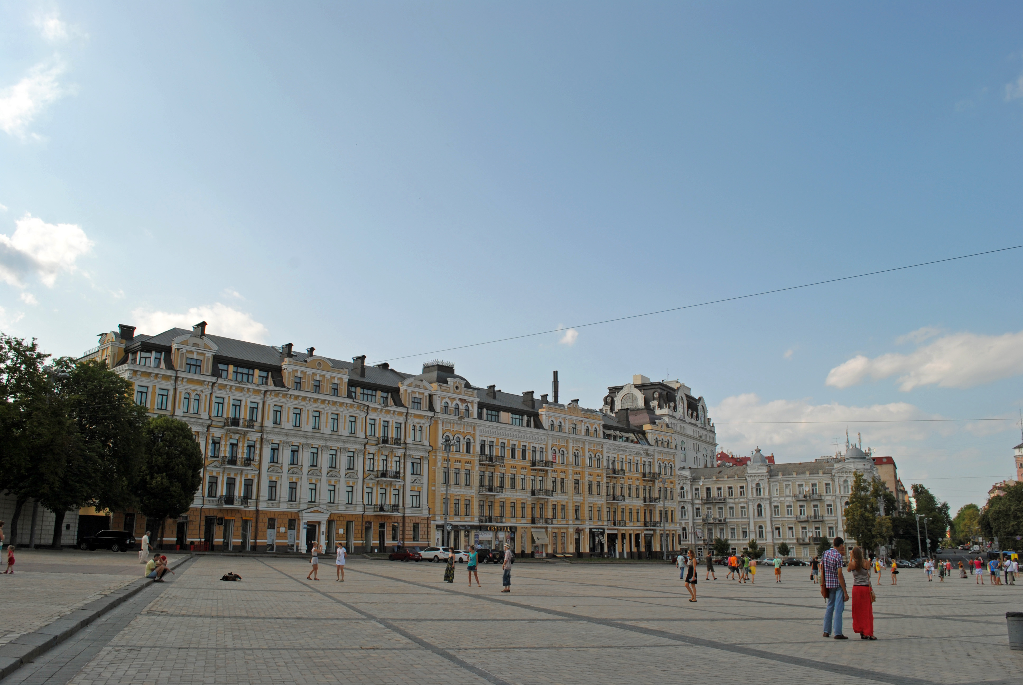 Комплекс прибуткових житлових будинків Управління Києво-Софійського митрополичого будинку, Київ, Володимирська вул., 20-22/3-5